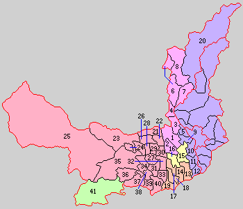 山梨県中巨摩郡の町村。